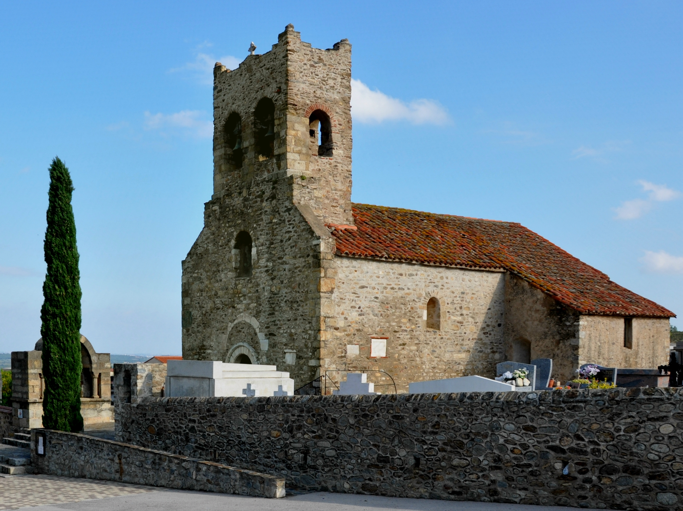 Église Saint-Saturnin de Montesquieu-des-Albères, 12e siècle, Roussillon, France